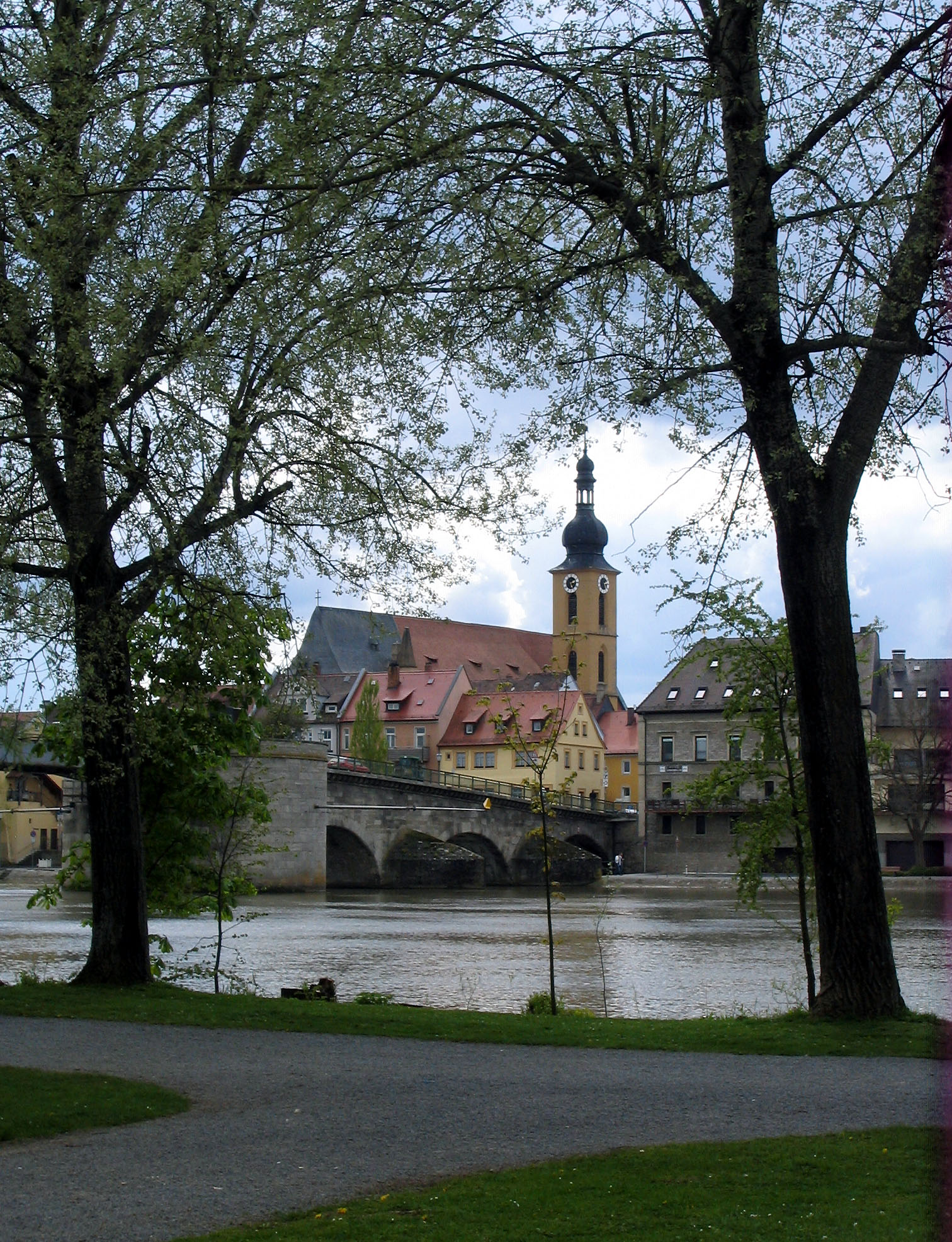 Alte Mainbrücke und Kirchturm von St.Johannes